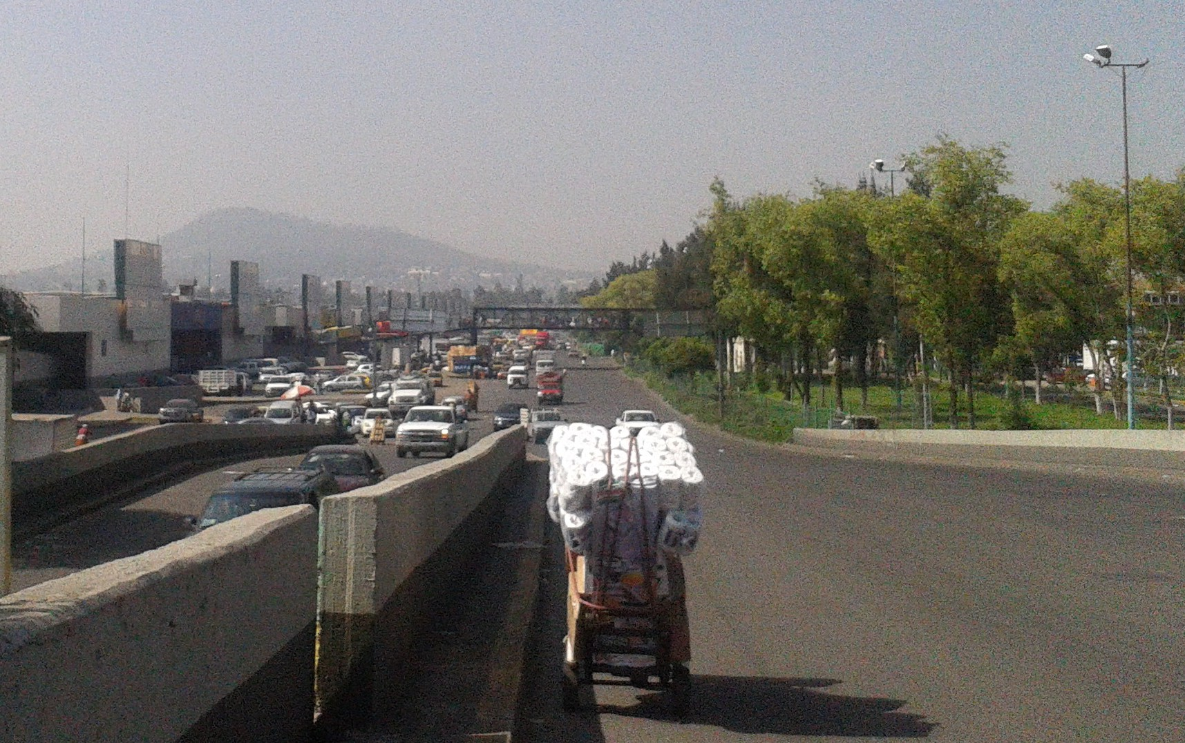 Vista del exterior de la zona de frutas y verduras de la Central de Abastos de la Ciudad de México (recorte).